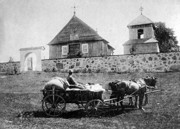 Беларуская (тарашкевіца): Асава (Asava). Стары касьцёл